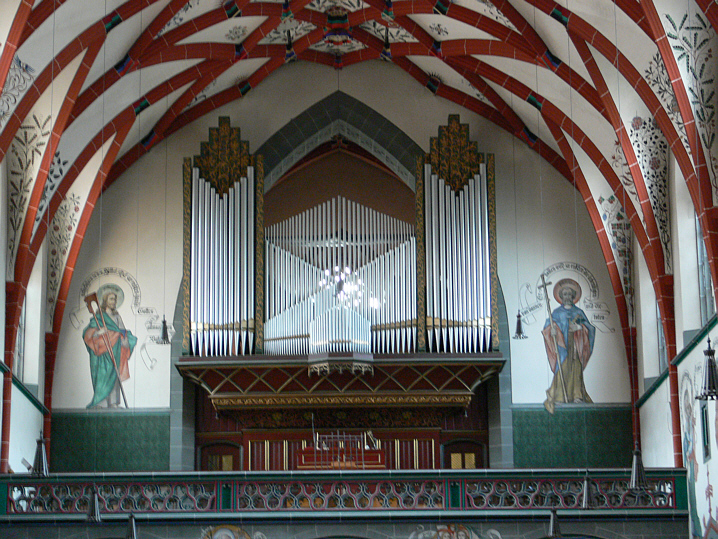 Katholische Pfarrkirche St. Georg, Ulm (Donau), ehemalige katholische Garnisonskirche Walcker-Orgel op. 1148, erbaut 1904, umgebaut 1964 durch REiser, restauriert 2004 durch Kuhn